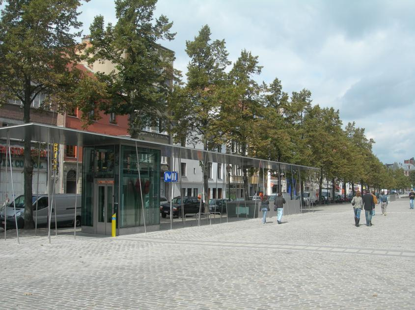 Photo de l'entrée de la Station Sainte-Catherine